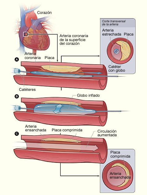 La ilustración muestra un corte transversal de una arteria coronaria que tiene depósitos de placa. La arteria coronaria se encuentra situada en la superficie del corazón. La figura A muestra el catéter con el globo desinflado que se ha insertado dentro de la arteria coronaria estrechada. En la figura B se observa que el globo se ha inflado, comprimiendo la placa y restableciendo el diámetro de la arteria. La figura C muestra la arteria ensanchada.